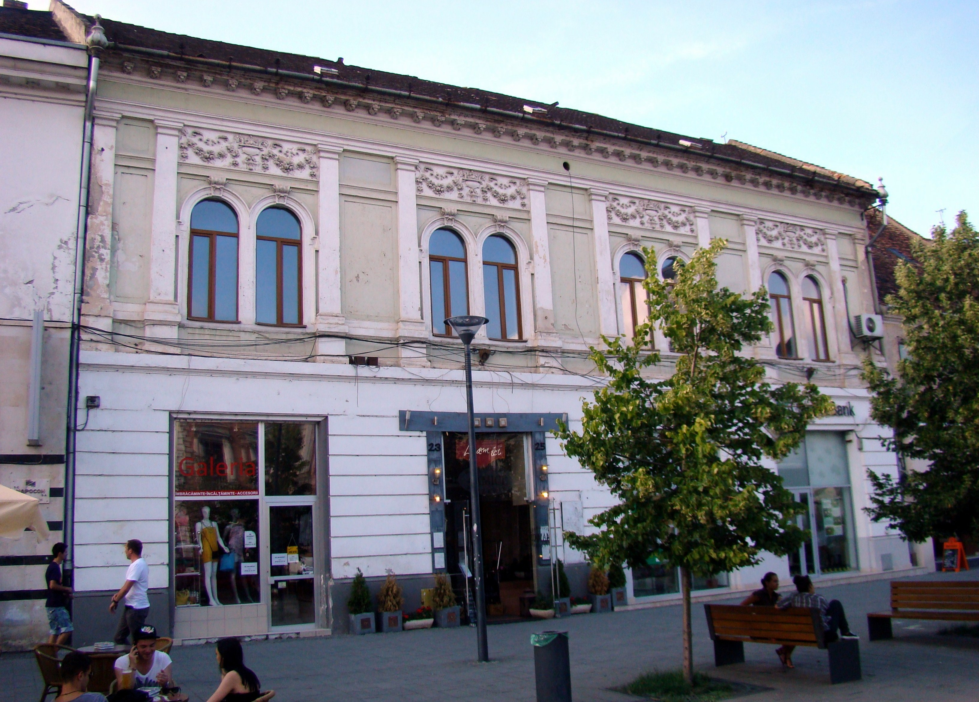 Clădire monument istoric, Bd.Eroilor, nr. 23-25 (Fosta casă a breslei cizmarilor)